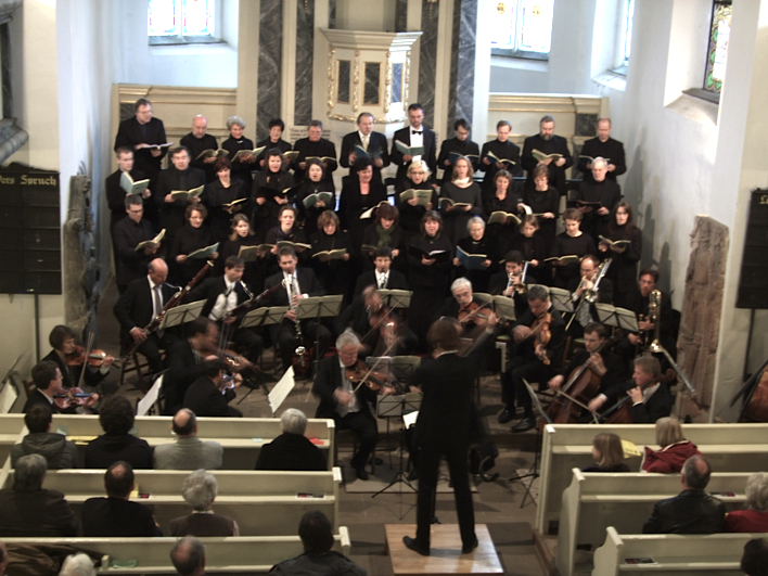 Mozart-Requiem, April 2010